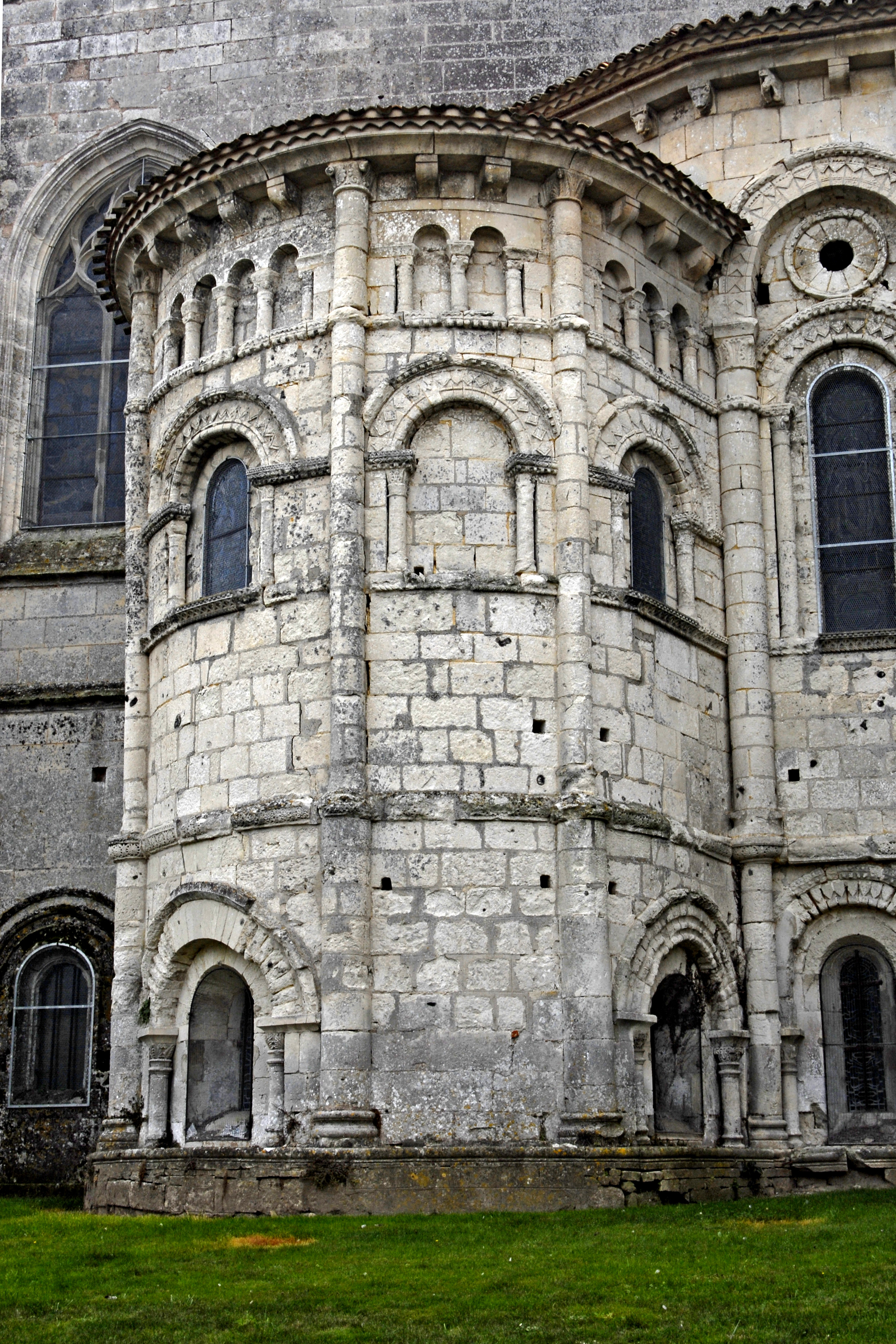 St.-Eutrope, Saintes, nordöstl. Umgangskapelle